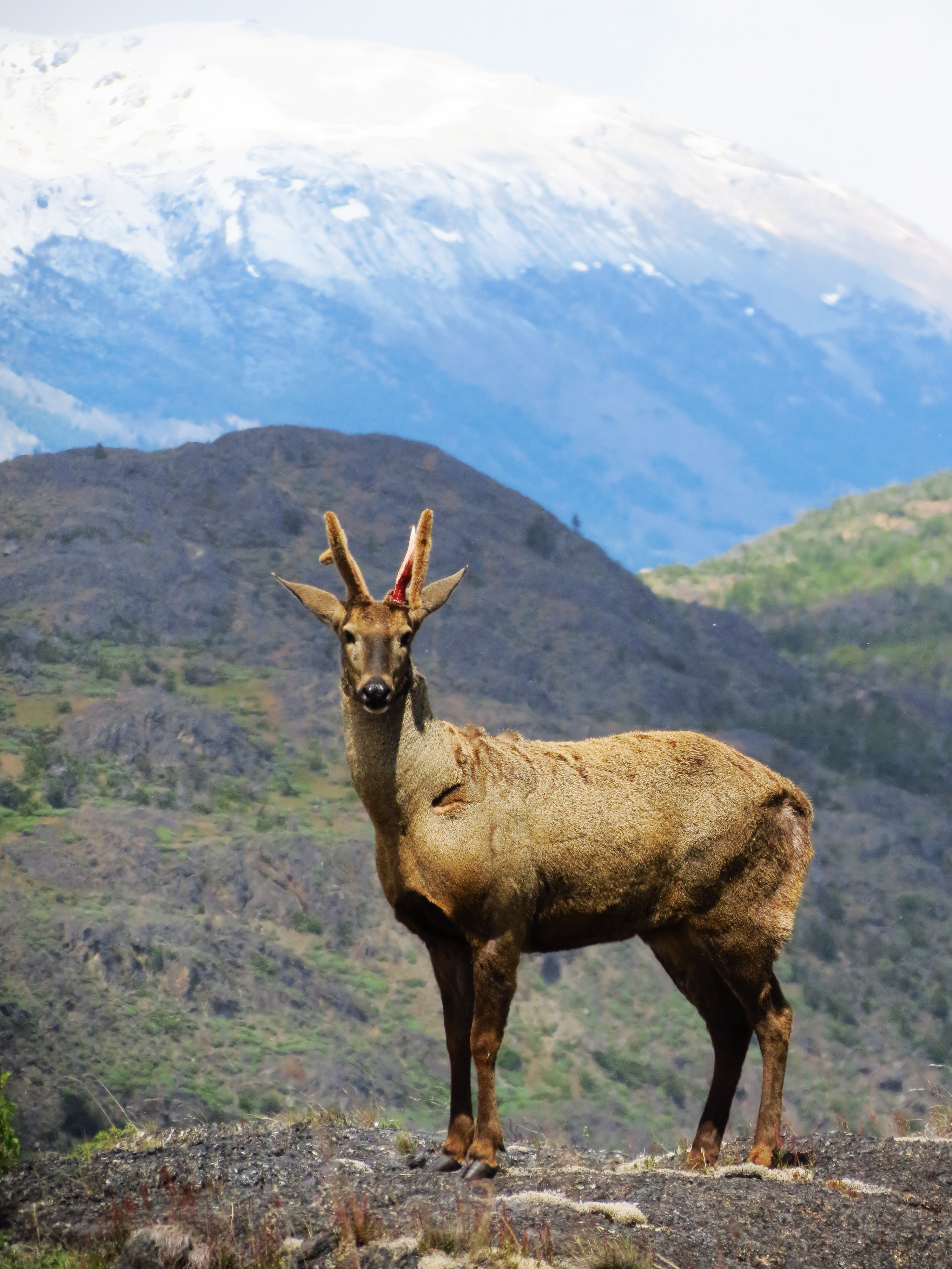 Fotografía tomada en la Reserva Tamango - Cochrane